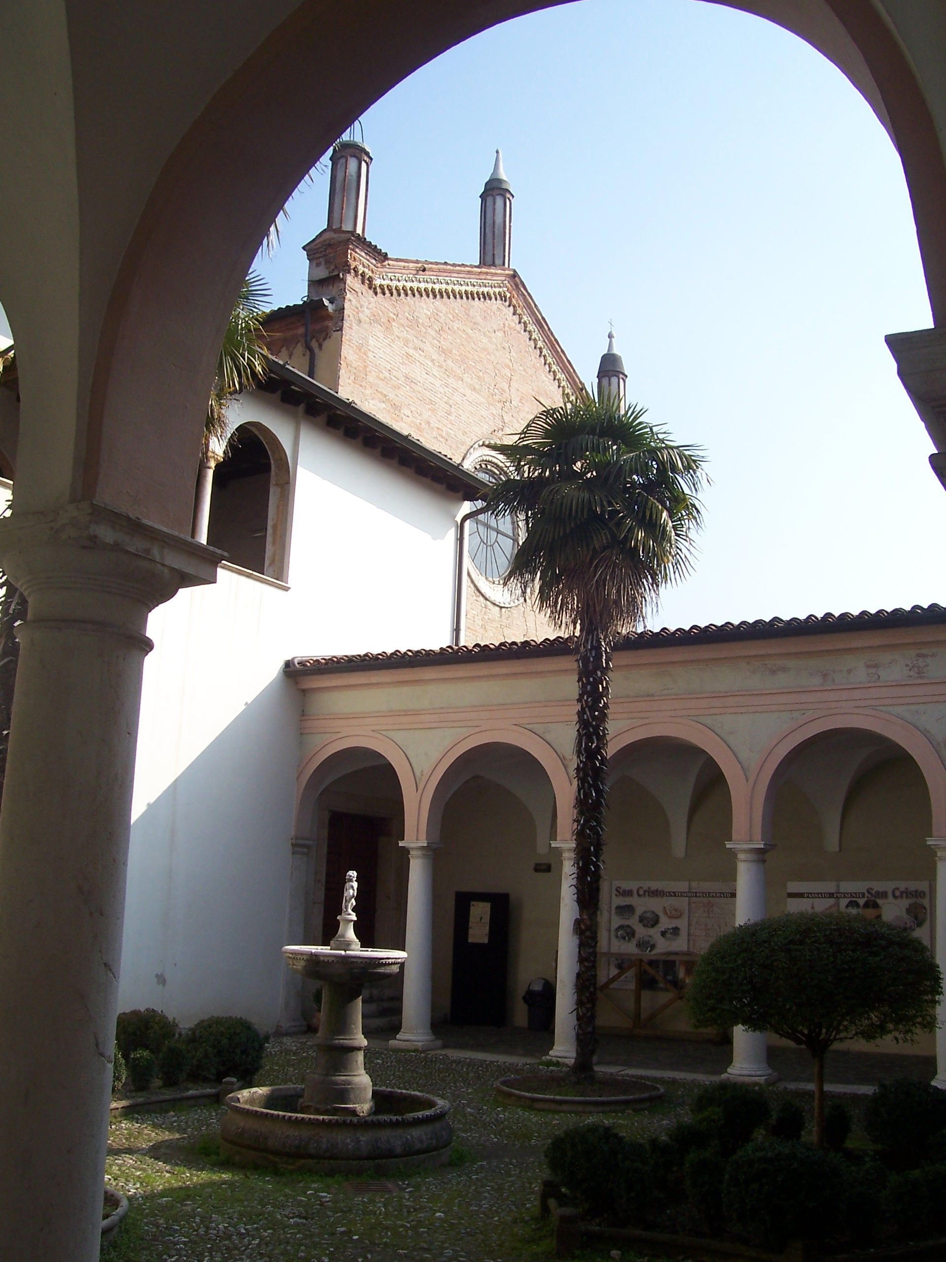 Santissimo corpo di cristo brescia chiostro piccolo1.jpg